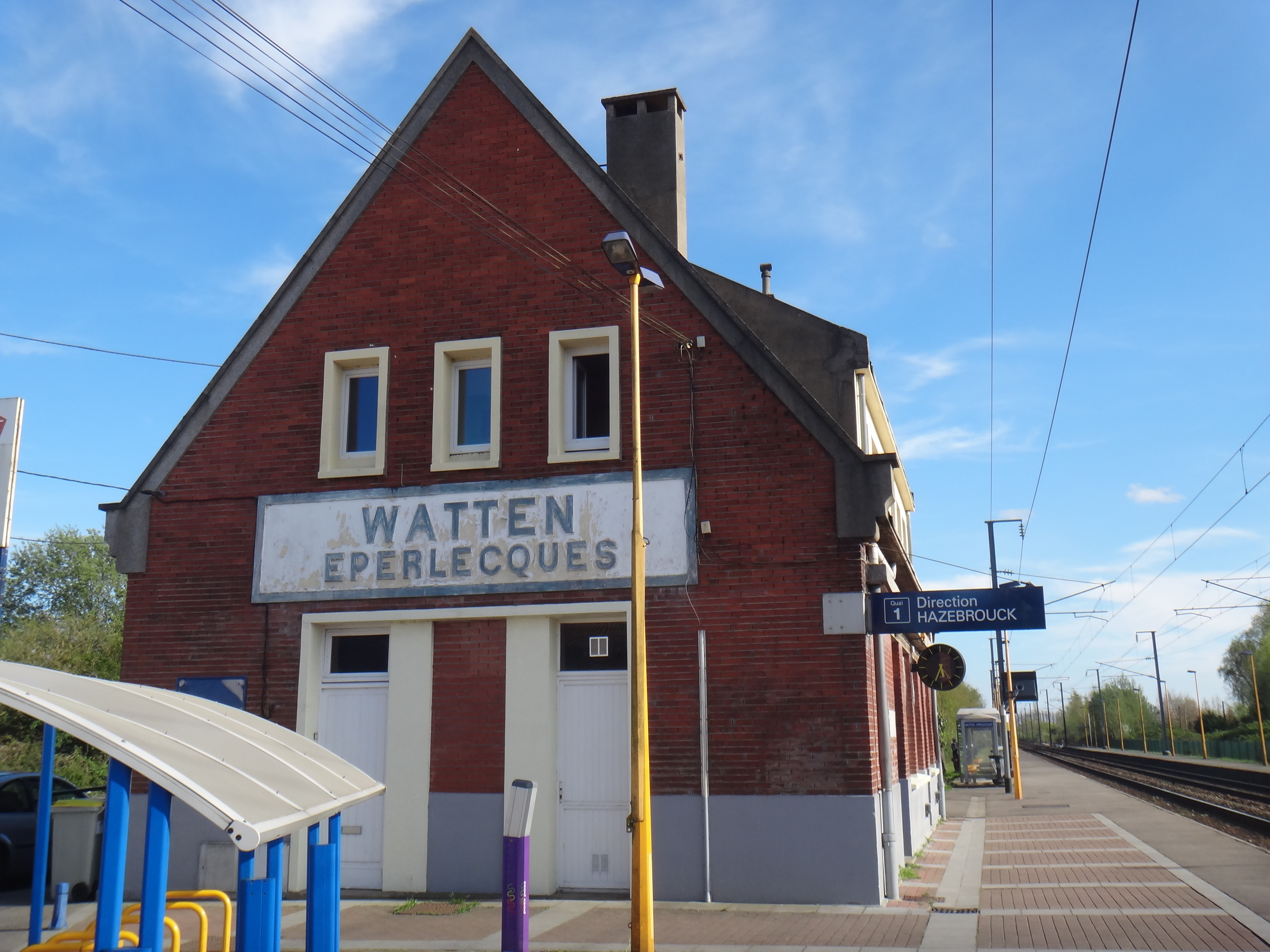 Gare de Watten-Eperlecques, Pas-de-Calais, France, en 2014